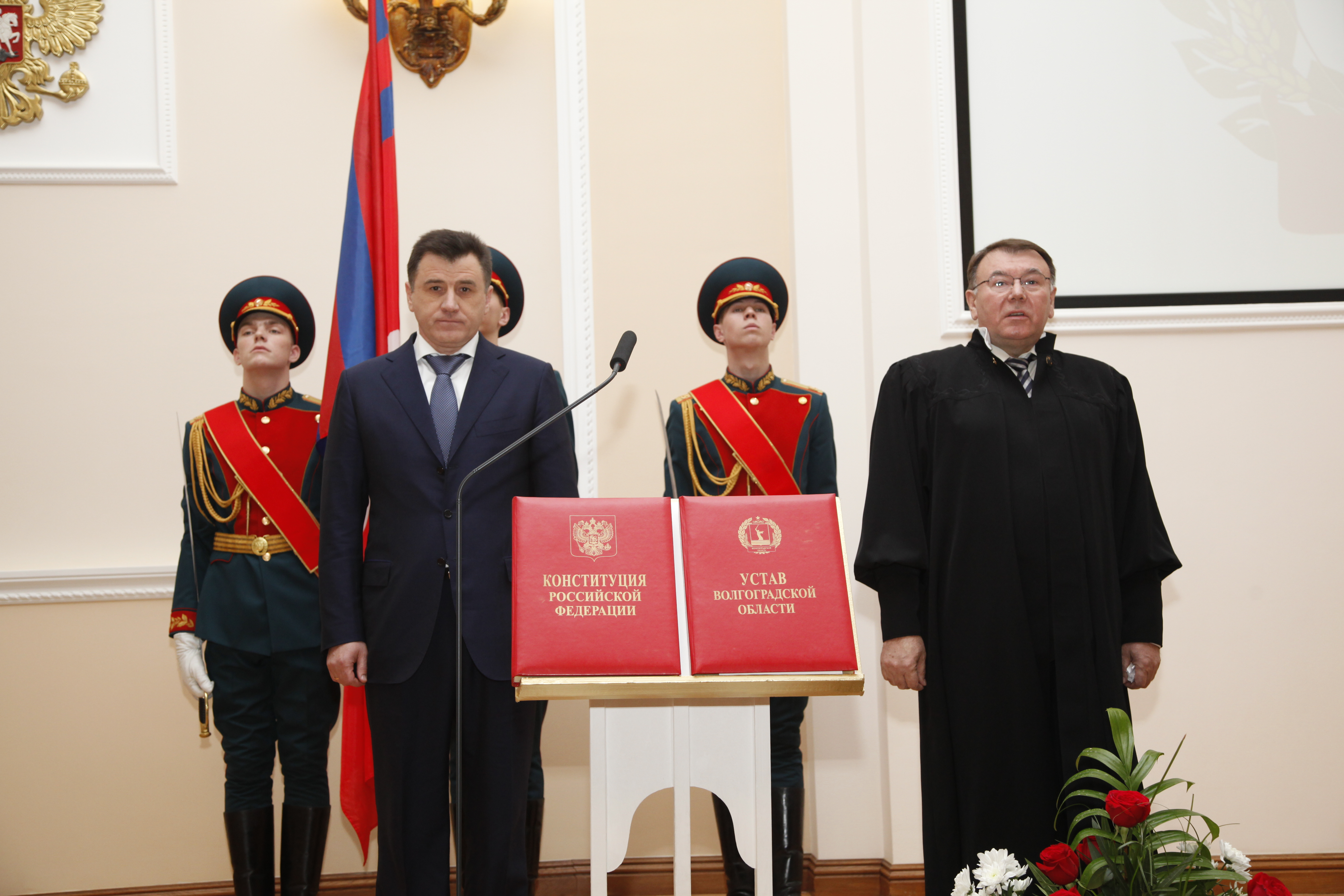 Инаугурация Сергея Боженова на должность главы администрации Волгоградской области. Справа - Председатель Волгоградского областного суда Сергей Потапенко.